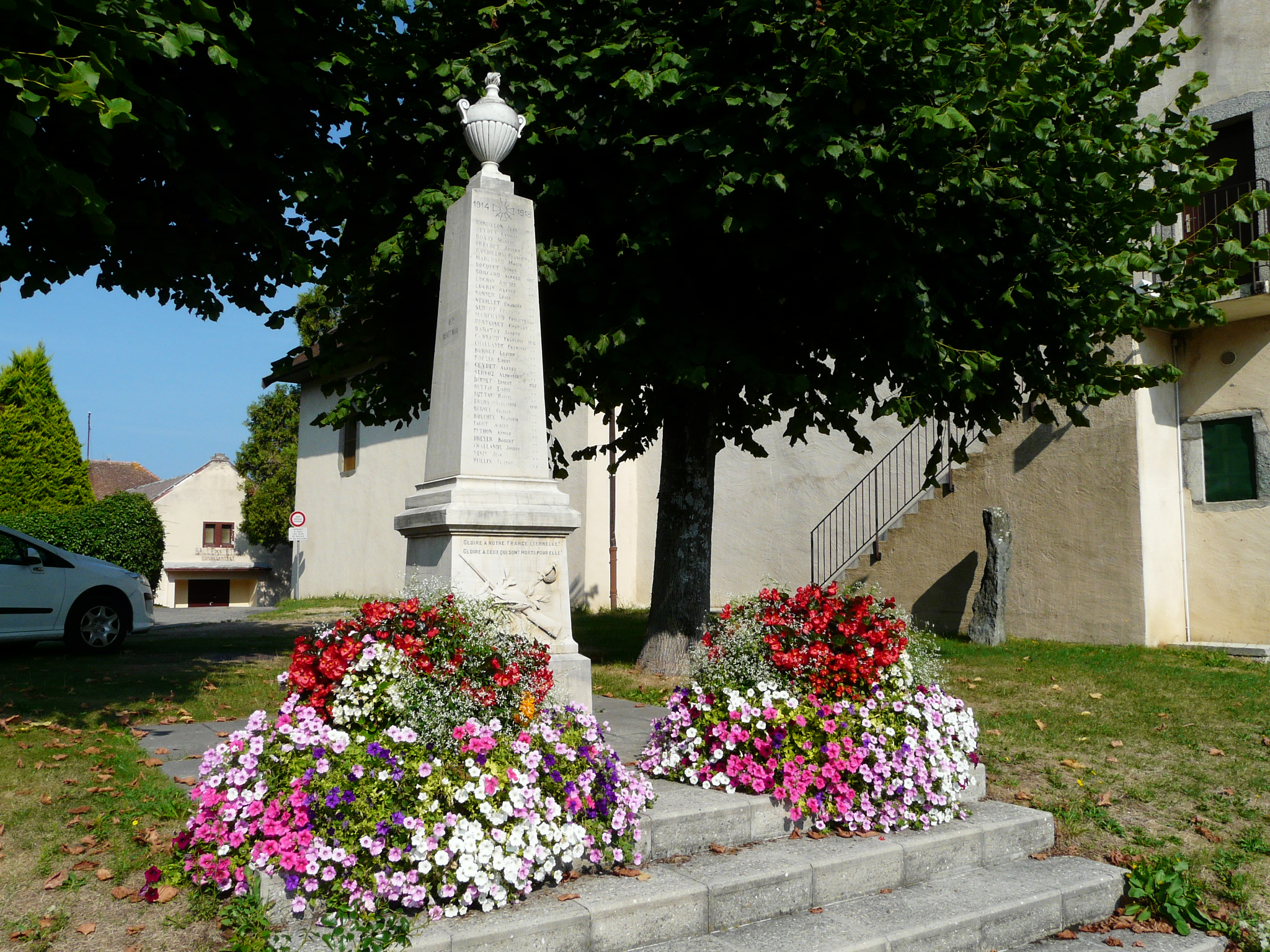 Maxilly-sur-léman : la salle des fêtes